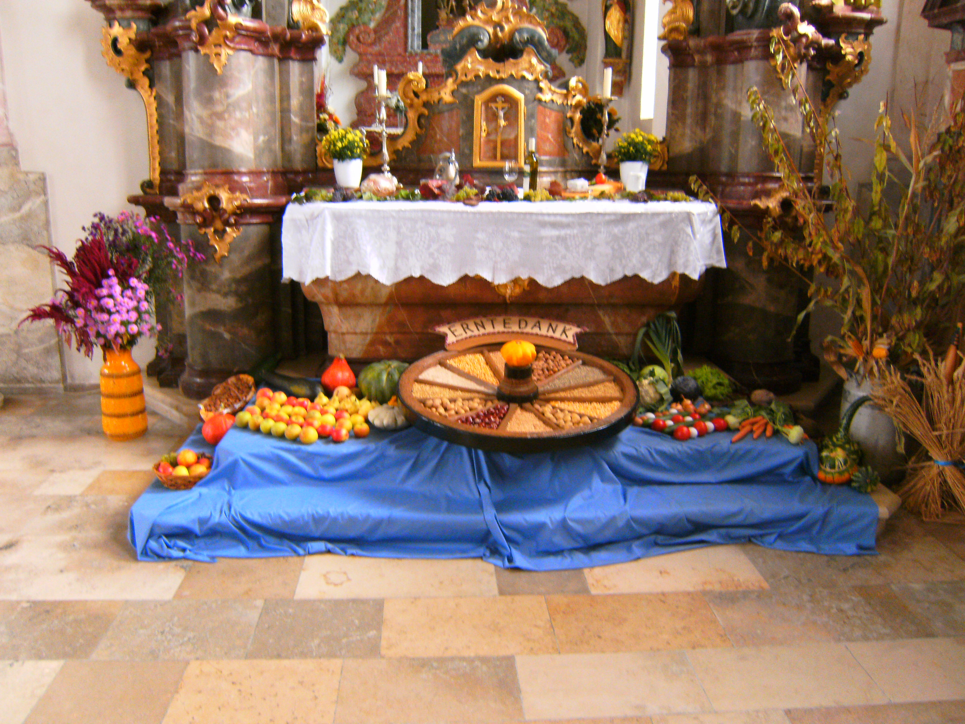 Wallfahrtskirche Baitenhausen: Erntedankfest im Jahr 2015 - Altarschmuck.